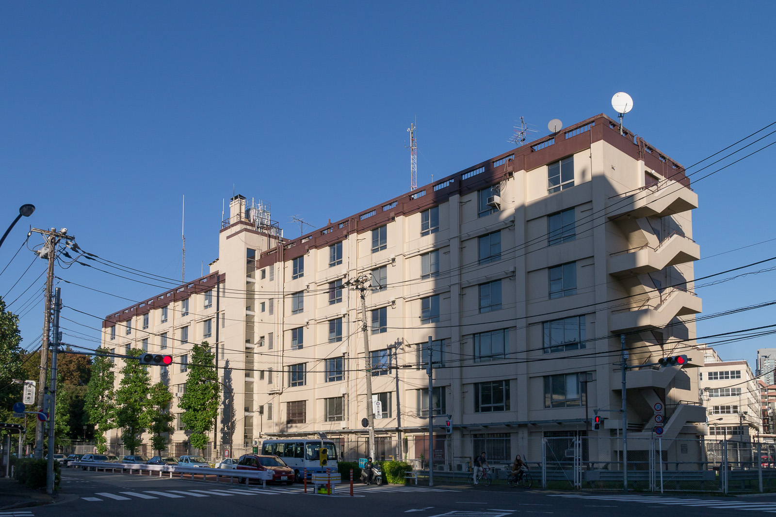 在日米軍赤坂プレスセンター、東京都港区六本木7丁目。